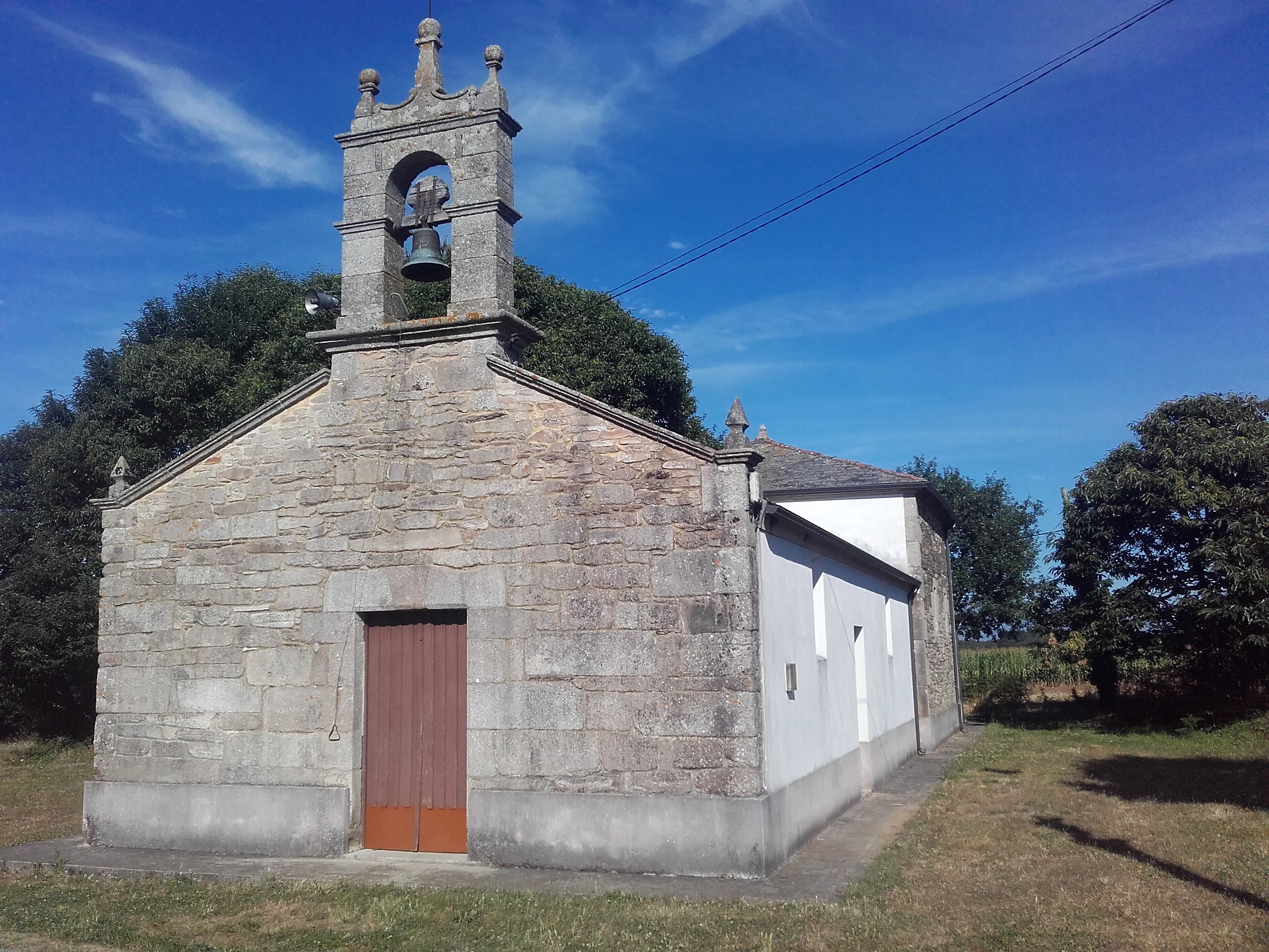 Igrexa de Santalla de Rioaveso, Cospeito.